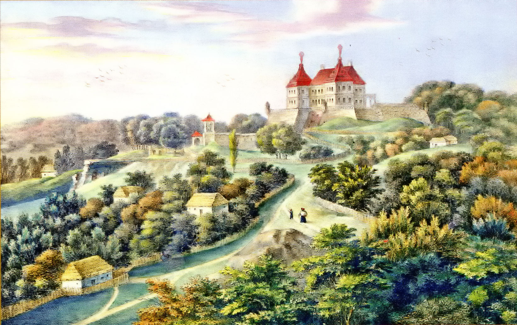 литография